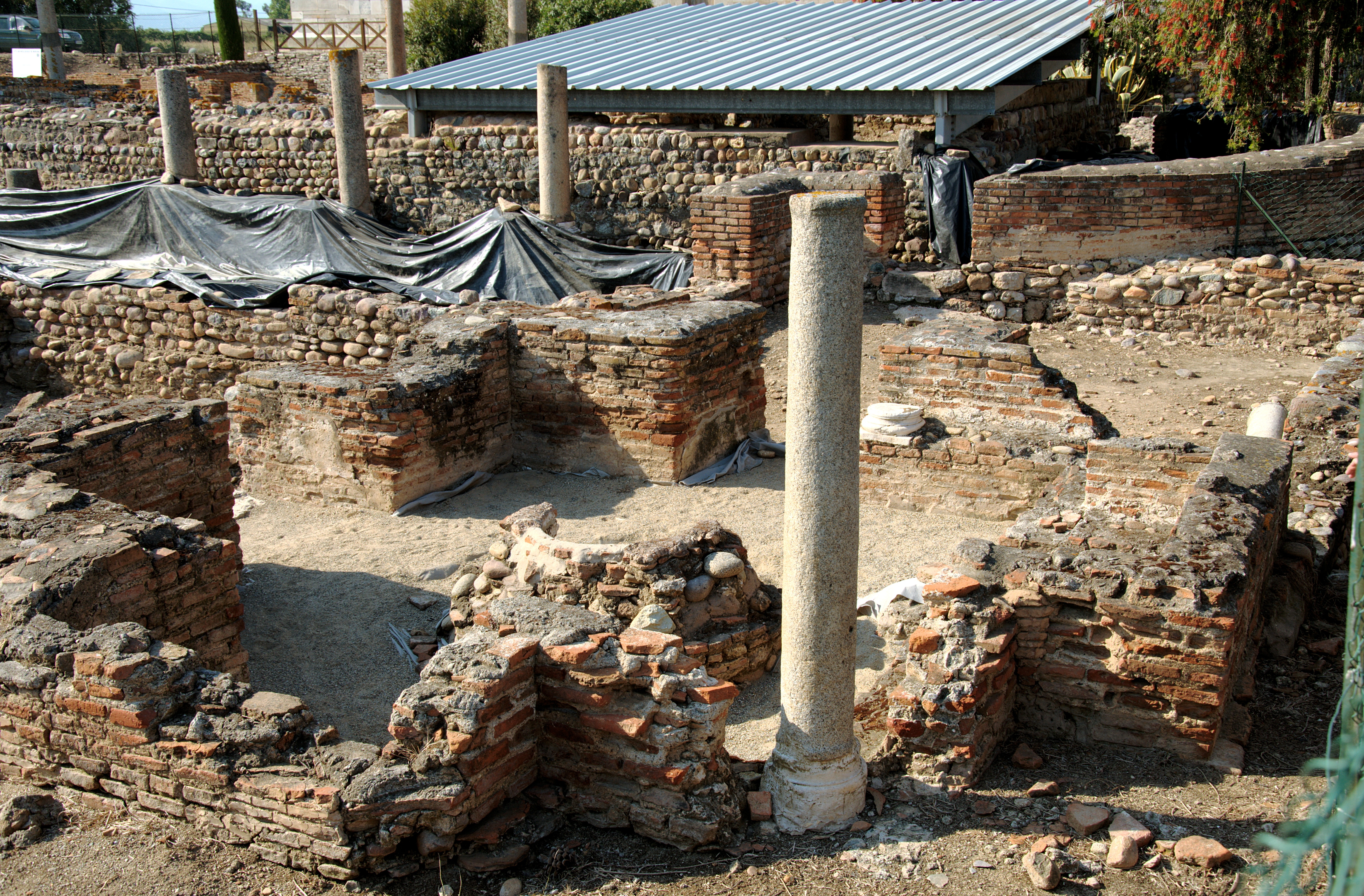 Баптистерий Марианы (V век).